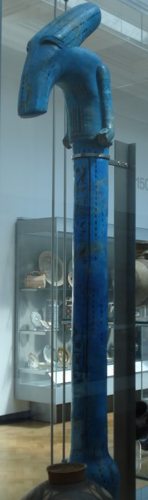 Sceptre monumental découvert en 1895 à Ombos, symbole du dieu Seth la divinité locale.